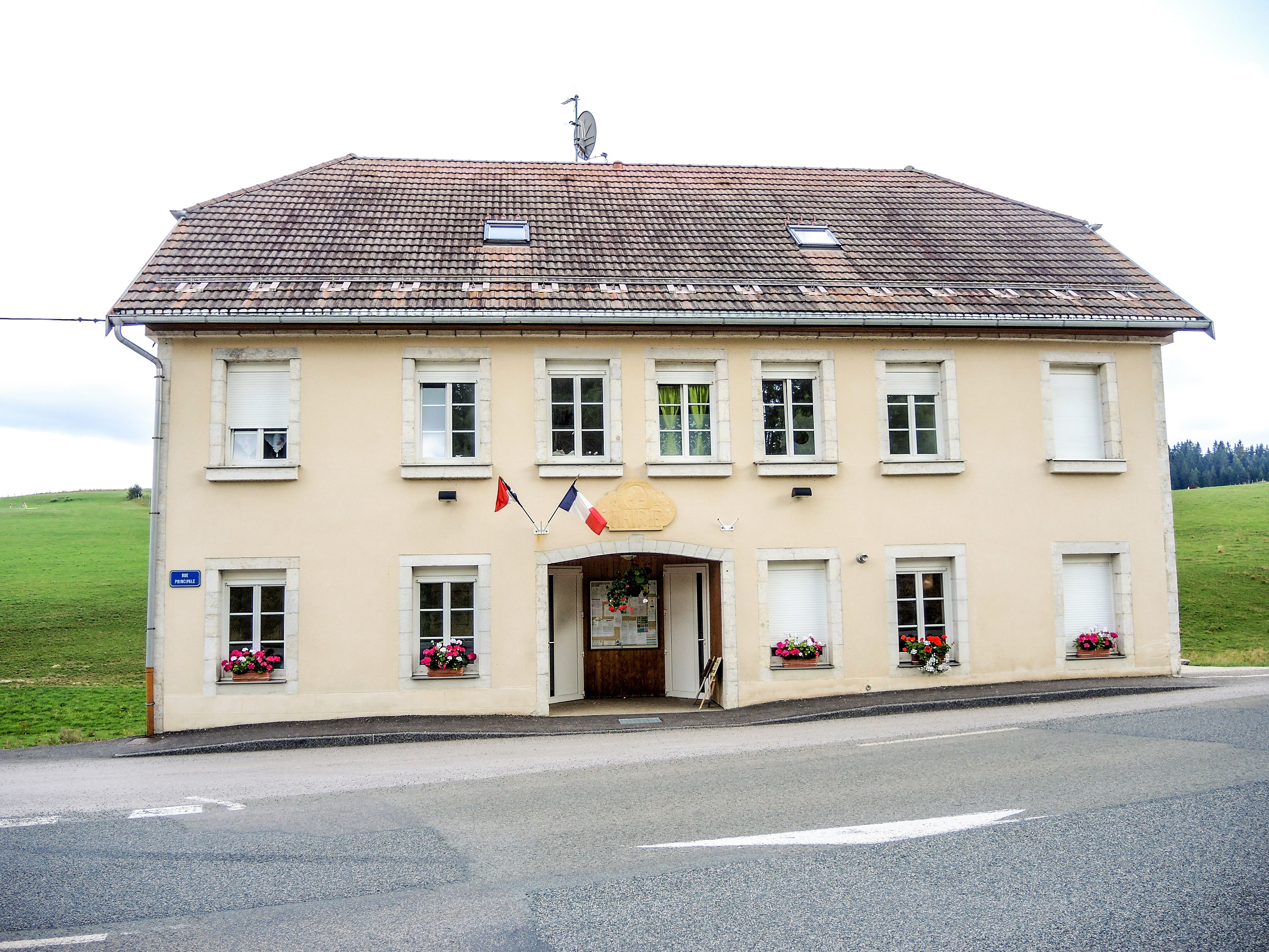 Façade de la mairie du Brey. Doubs